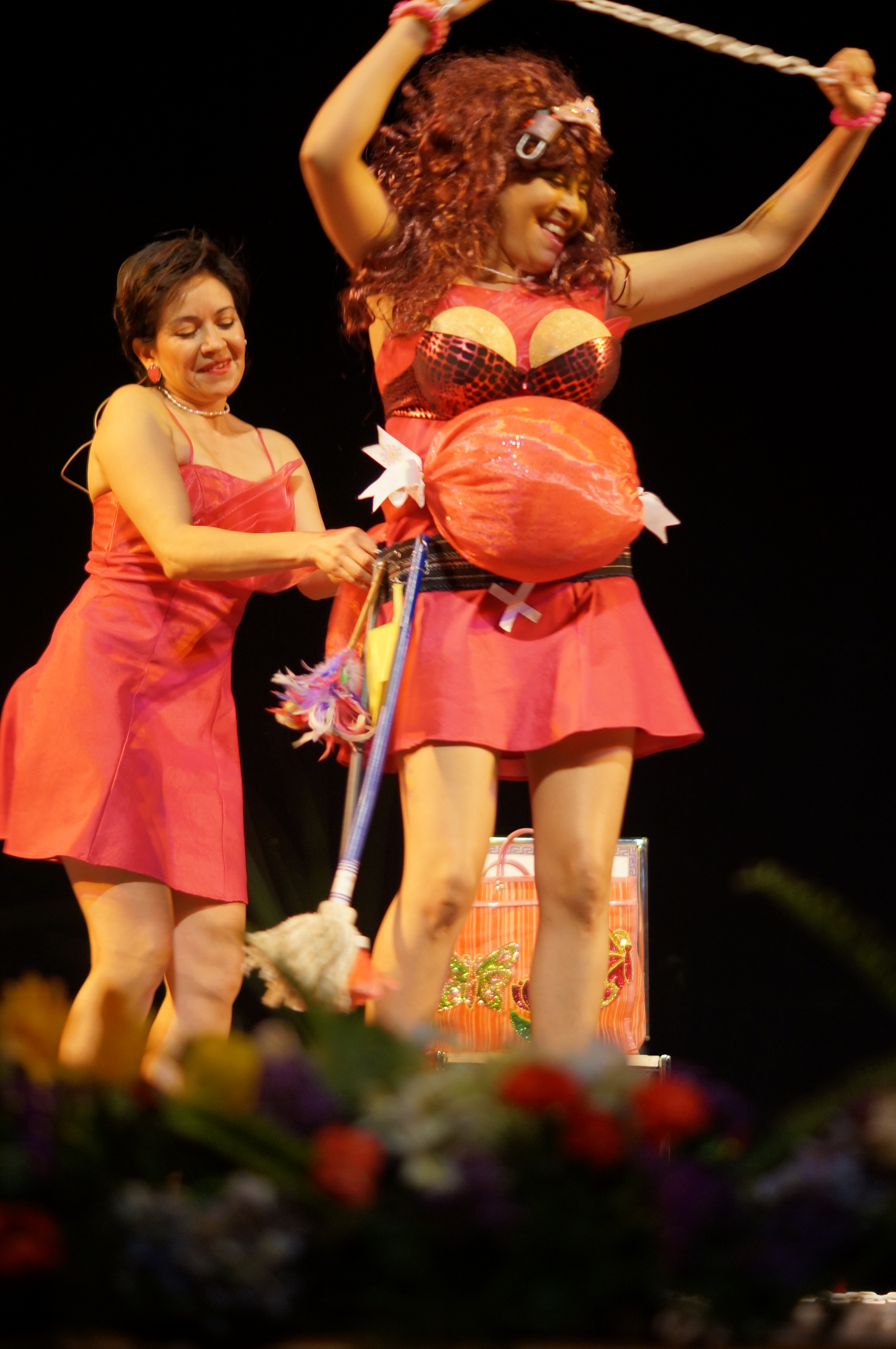 Presentación de la obra ¿Qué veo cuando me veo? de Ellas en Escena.